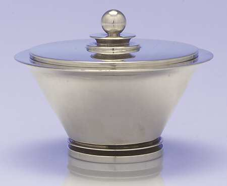 georg jensen denmark pyramid sterling 1927 hollowware sugar bowl with lid